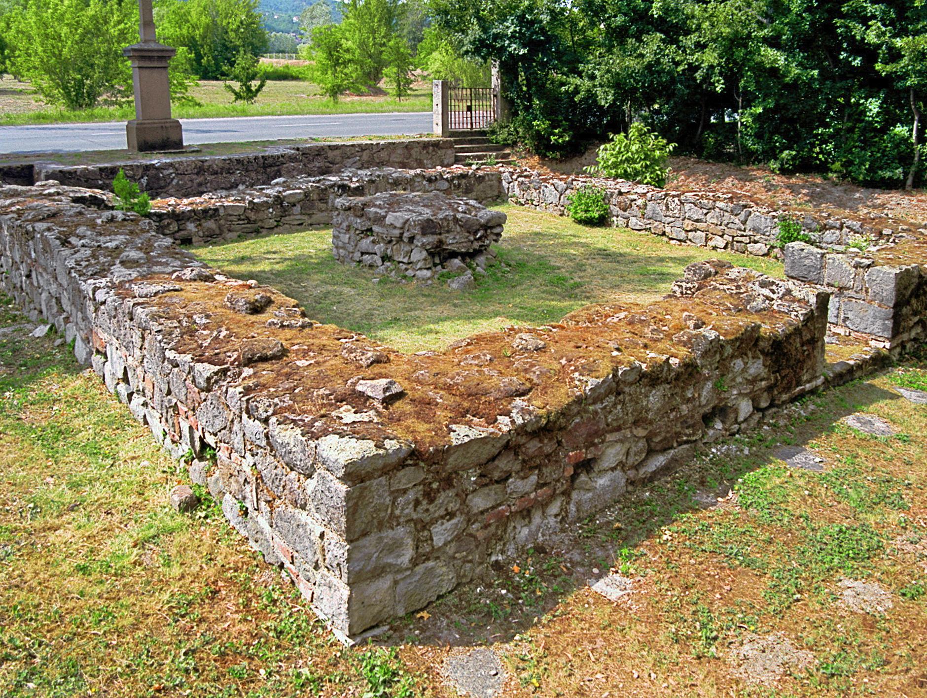 Visegrád-Steinbruch – Ungarn: Burgus Solva 24. Blick von Süden.